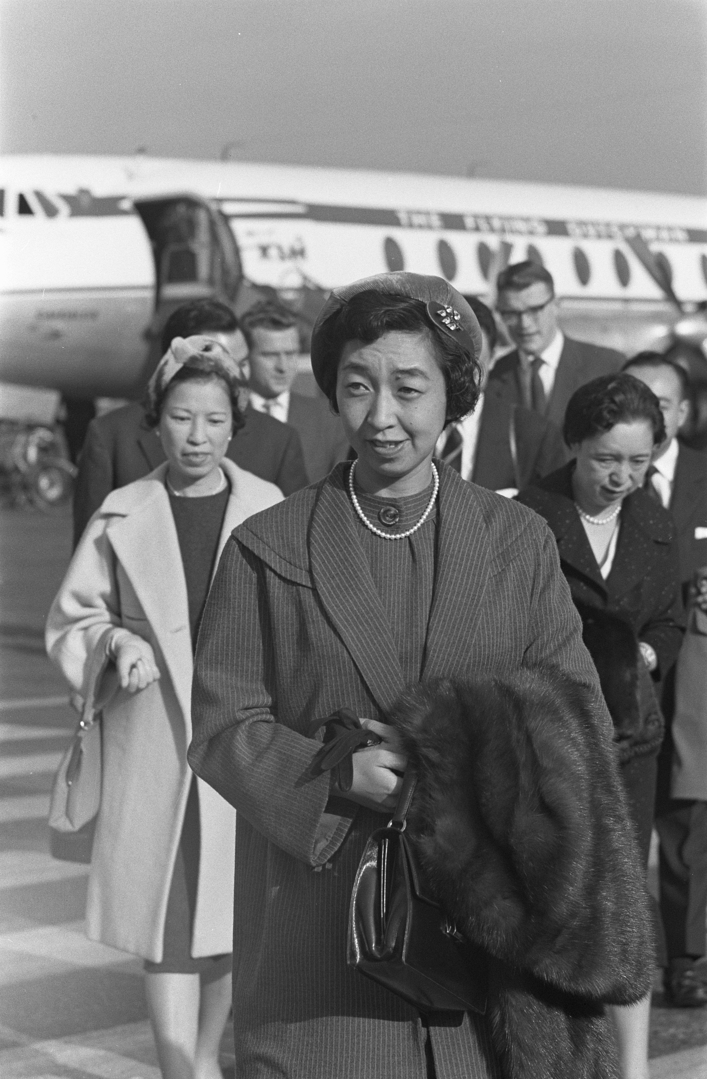 Collectie / Archief : Fotocollectie Anefo Reportage / Serie : [ onbekend ] Beschrijving : Dochter van de Keizer van Japan , Shigeko Higashikuni op Schiphol Datum : 14 oktober 1959 Locatie : Noord-Holland, Schiphol Trefwoorden : aankomst en vertrek, portretten, prinsessen Persoonsnaam : Higashikuni Shigeko Fotograaf : Pot, Harry / Anefo Auteursrechthebbende : Nationaal Archief Materiaalsoort : Negatief (zwart/wit) Nummer archiefinventaris : bekijk toegang 2.24.01.05 Bestanddeelnummer : 910-7442